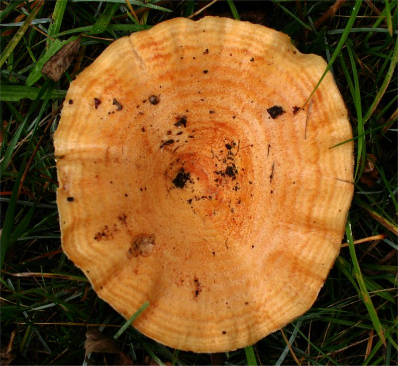 Lactarius zonarius (Bull.) Fr.